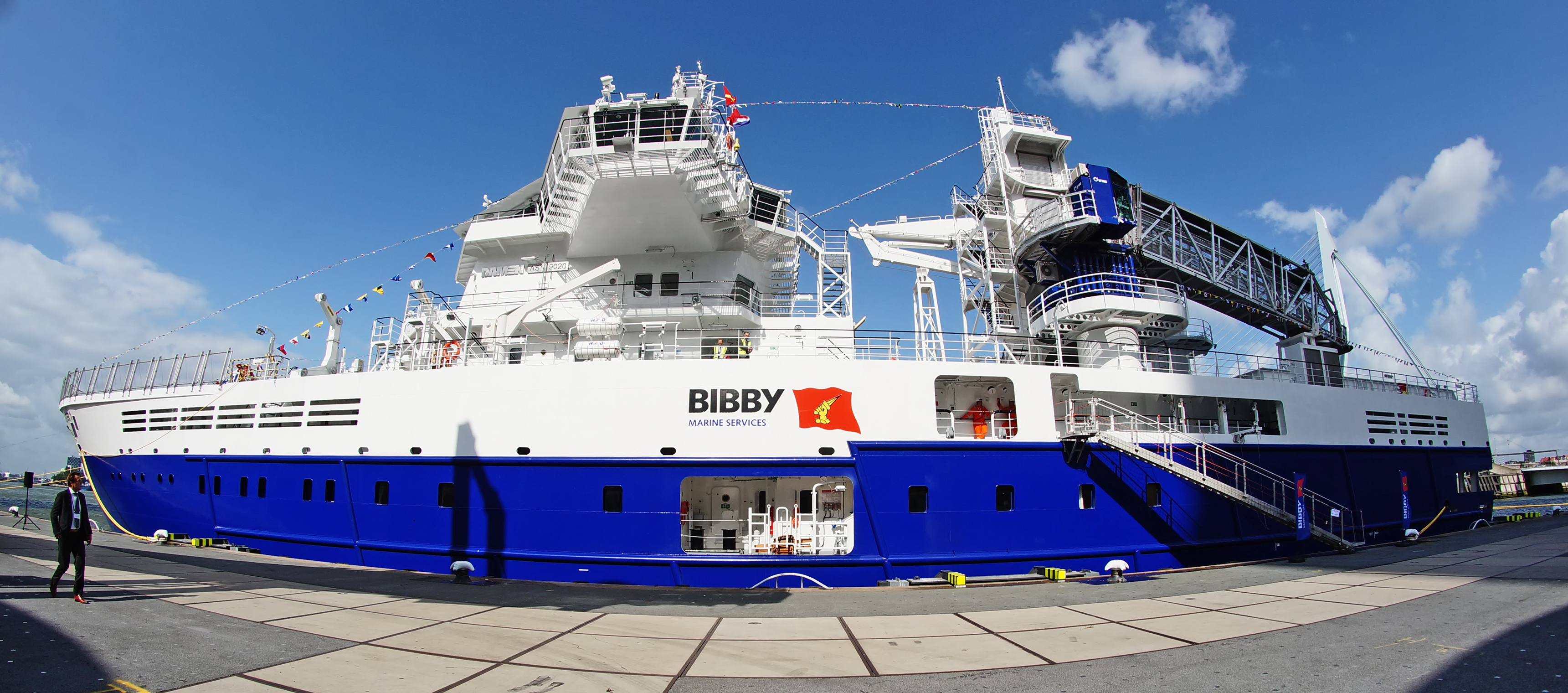 Holland Amerikakade Rotterdam 6-9-2017 , vandaag werd de BIBBY WAVEMASTER gedoopt .